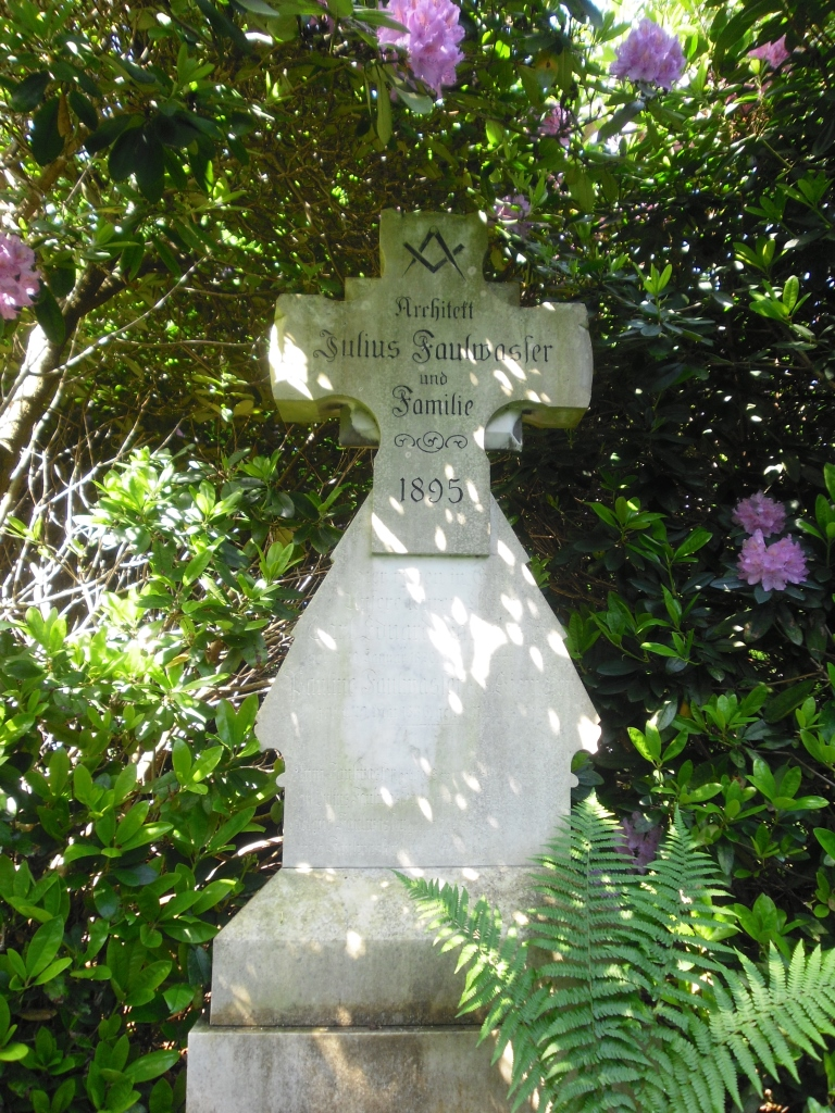 Grab des Architekten und Bauhistorikers Carl Julius Faulwasser (1855-1944) auf dem Ohlsdorfer Friedhof in Hamburg